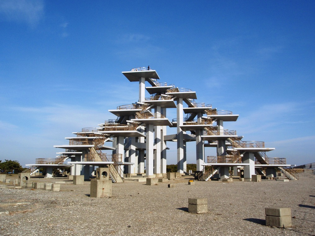 千葉県富津岬展望台